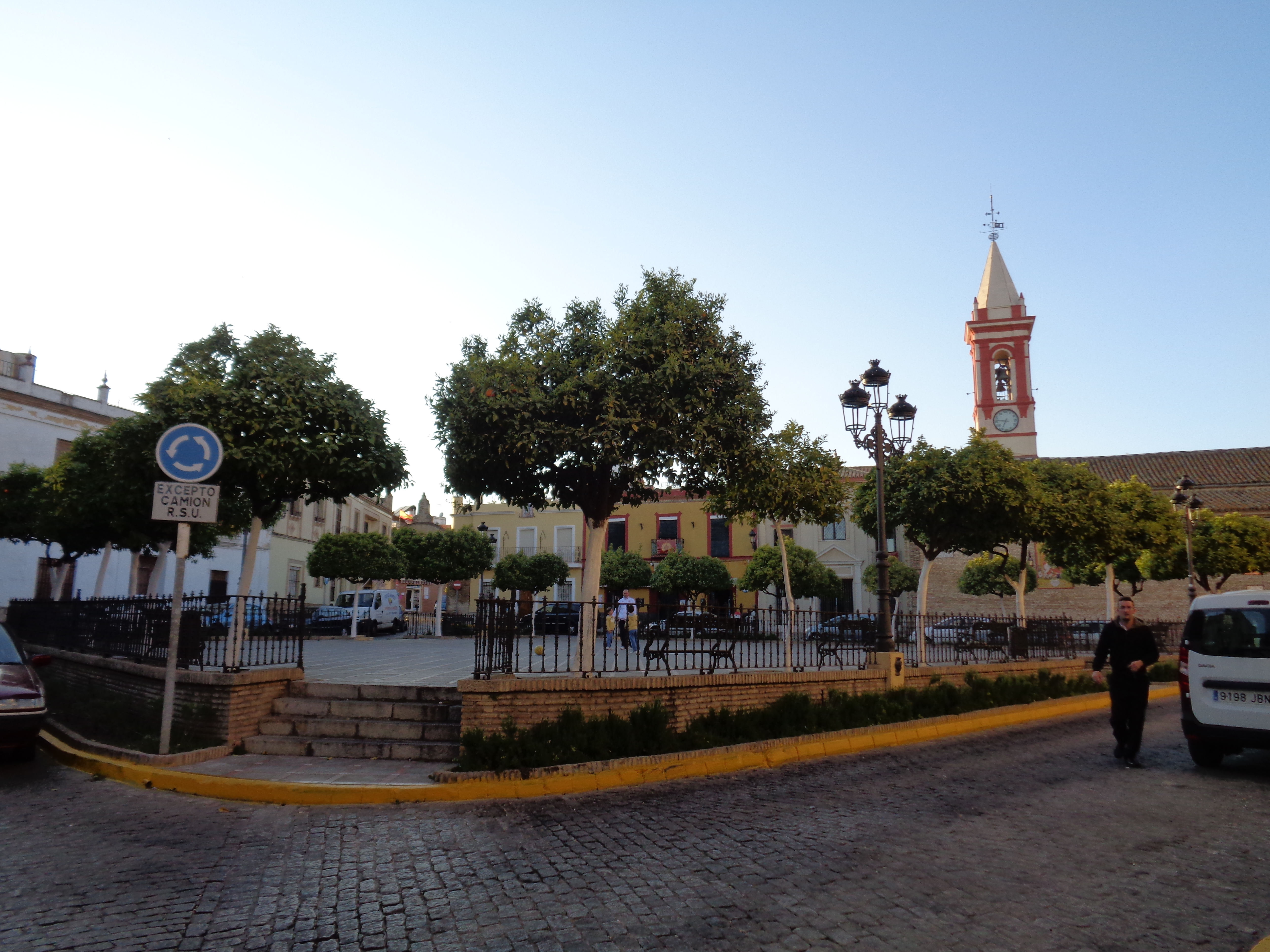 Plaza de Castilleja de la Cuesta, en la provincia de Sevilla